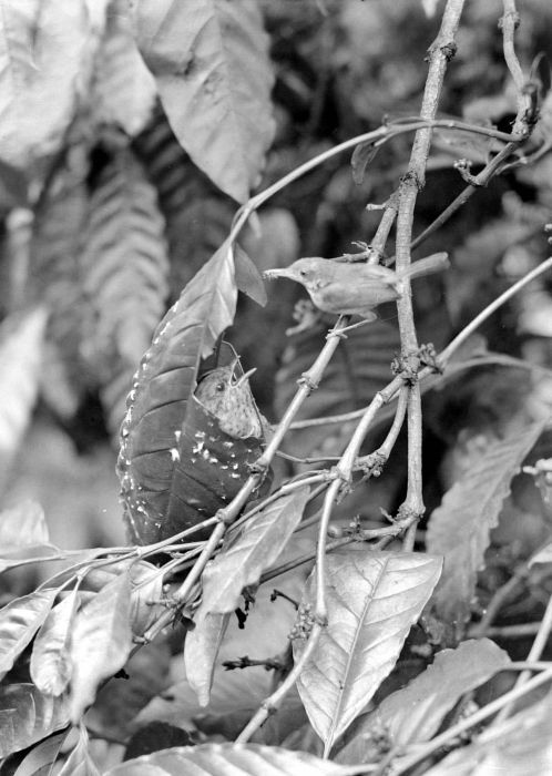 Repronegatief. Orthotomus sepium sepium bij het nest, waarin jong van Cacomantis merulinus lanceolatus